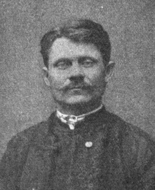 Österreichischer Politiker, Reichsratswahl 1907, Name siehe Dateiname